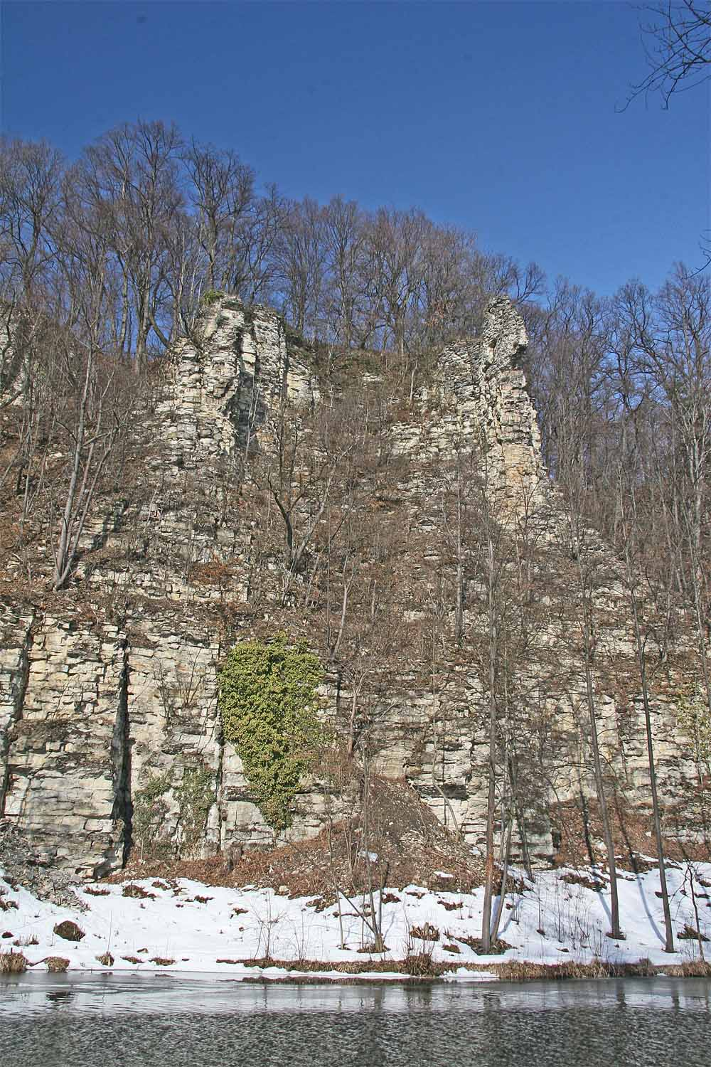 Přírodní rezervace Peliny